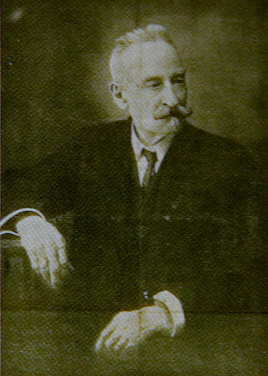 Retrat de Josep Tapiró i Baró a Tànger. La foto va ser publicada el 1913 al diari "El Porvenir" de Tànger amb la ressenya de la seva mort.